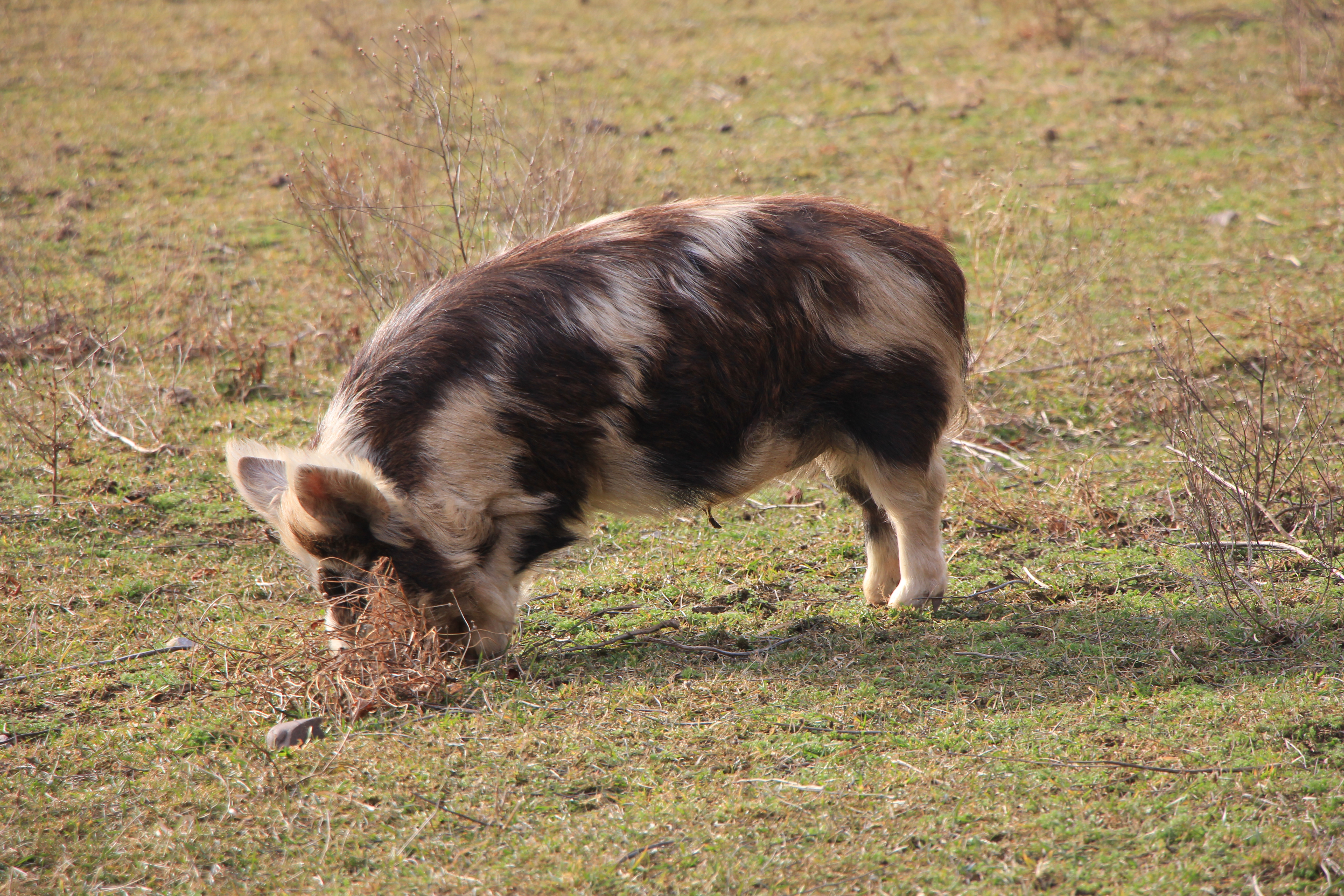 KunekuneSchwein in der Forschungsstation der vetereinärmedizinischen Universität Wien im Haidlhof